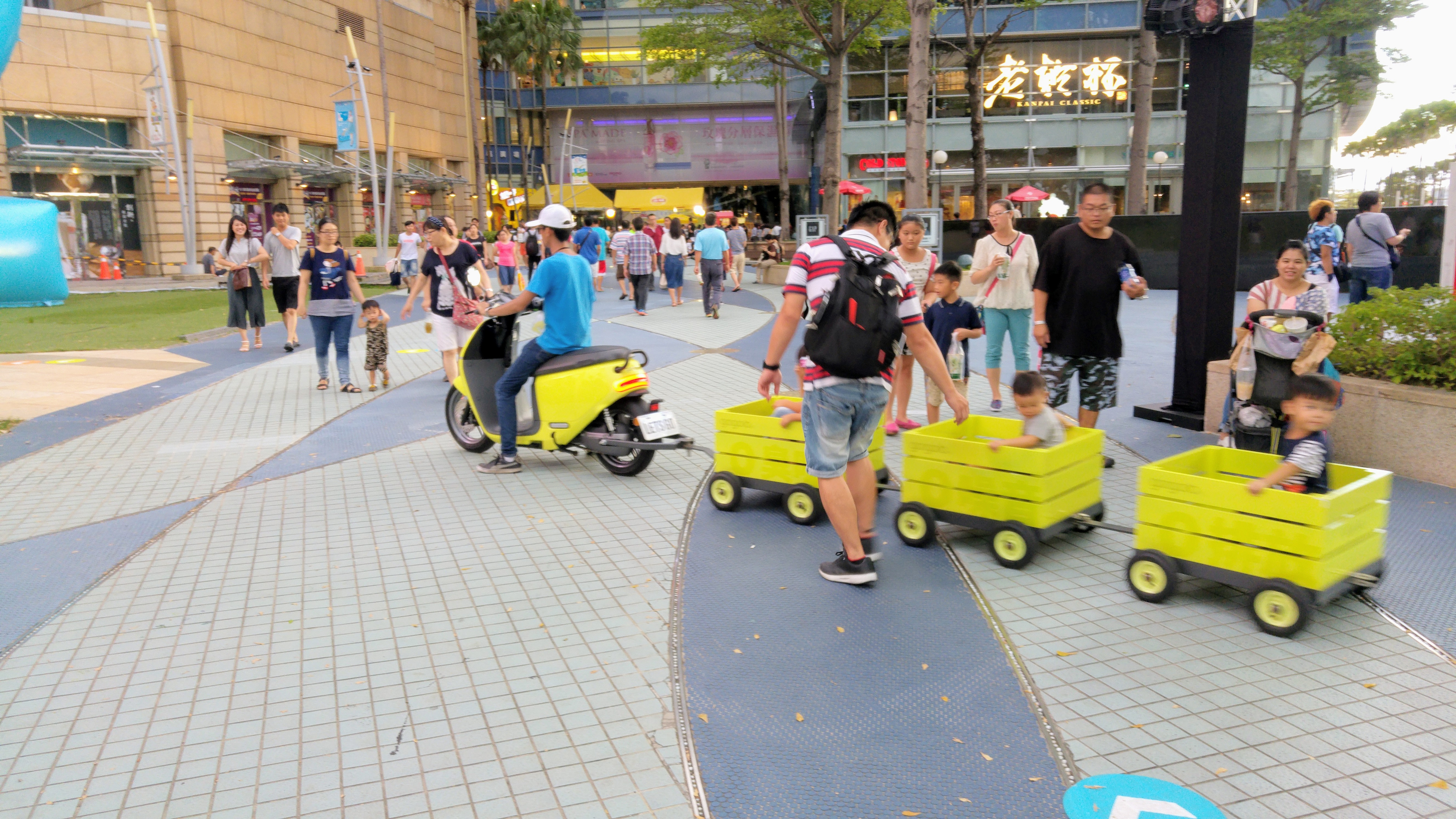 Gogoro Wonderland 中能夠讓兒童乘坐在拖車上，並由 Gogoro 2 Series 機車進行拖行以展示其動力。